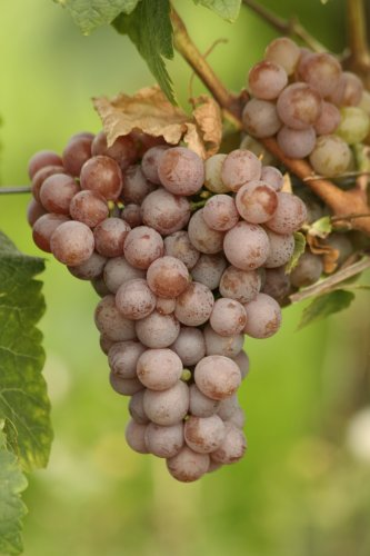 Gewürztraminer Weintrauben (Traminer Weisswein) (Original text: Roter Traminer Weintrauben (Gewürztraminer Weisswein)) Software: GIMP Andere Versionen